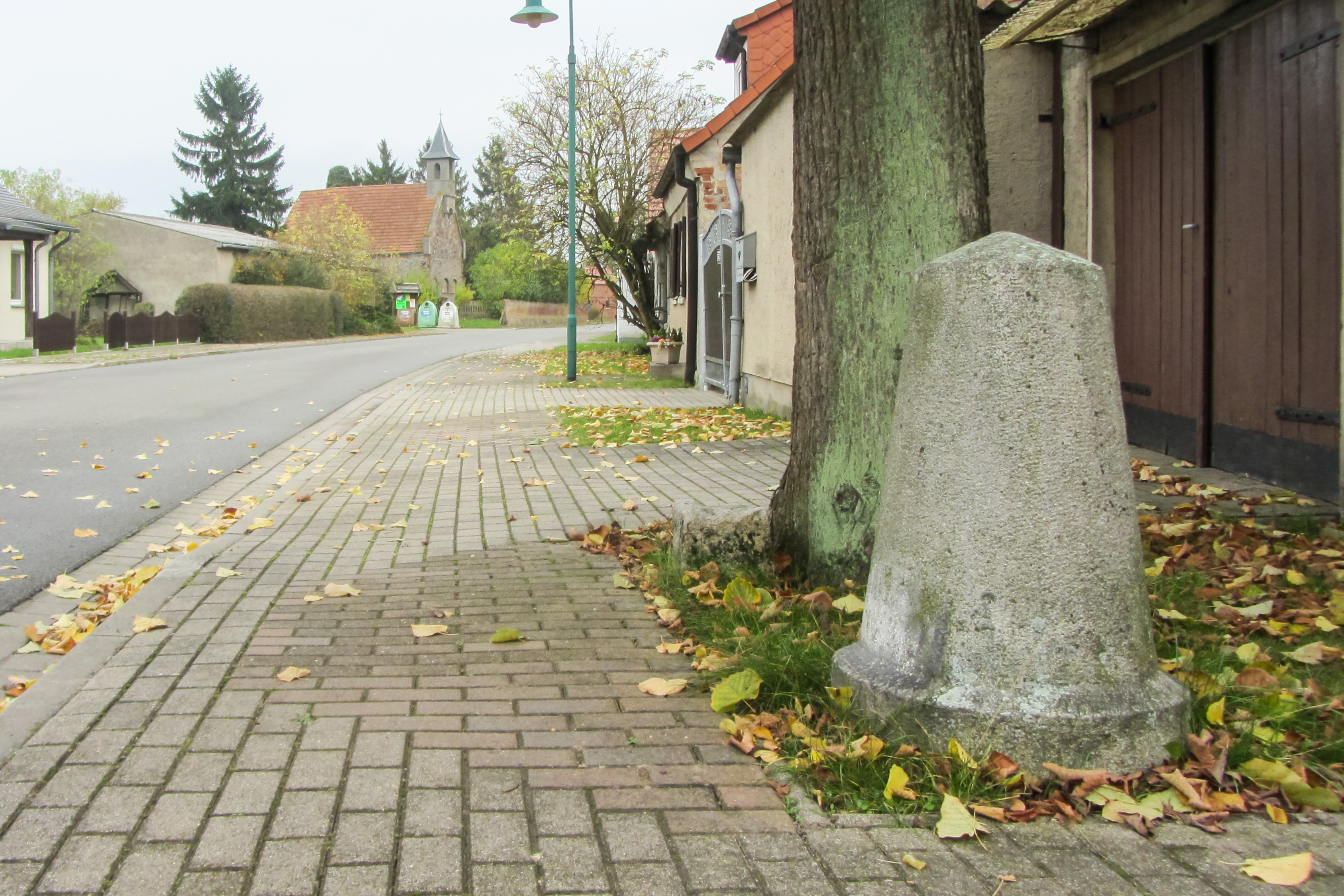 Preußischer Rundsockelstein, vor Hauptstraße Nr. 6 in Hohenberg-Krusemark OT Alzenzaun